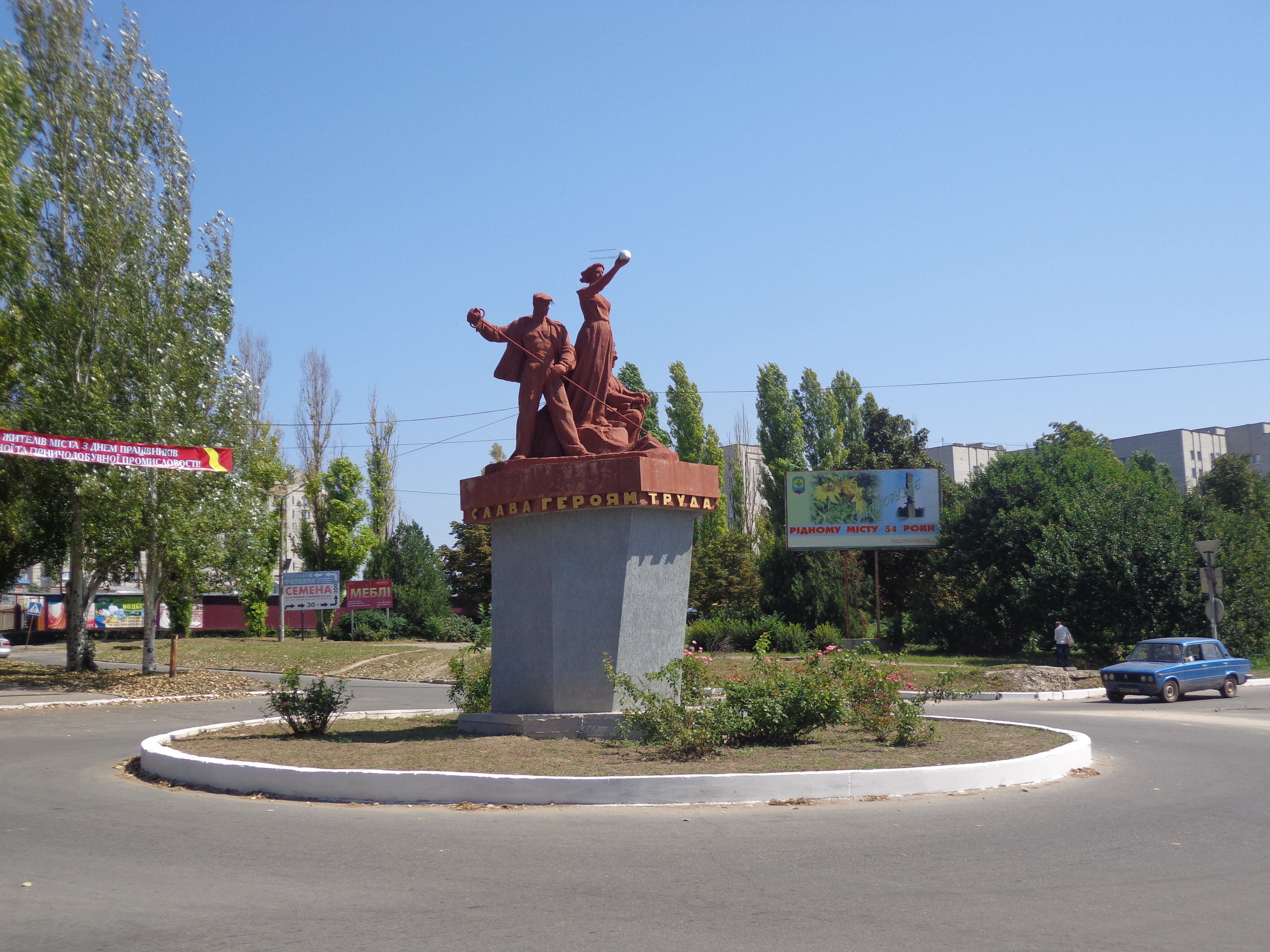 Памятник. Днепрорудное, Запорожская область, Украина.